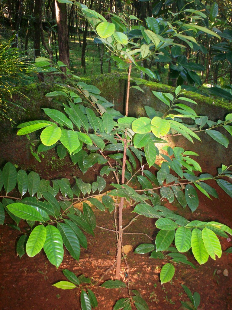 ജാതിത്തൈ